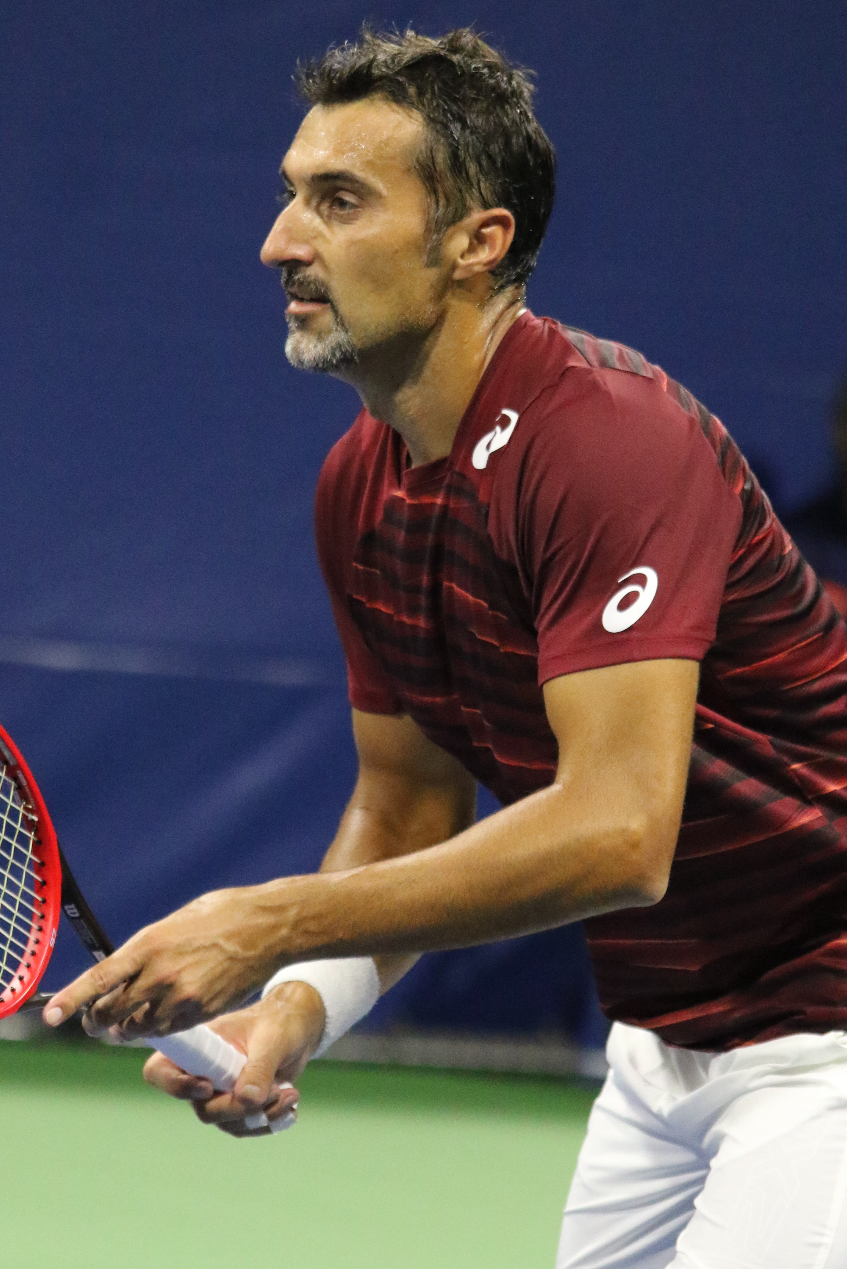 Zimonjic US16 (14)